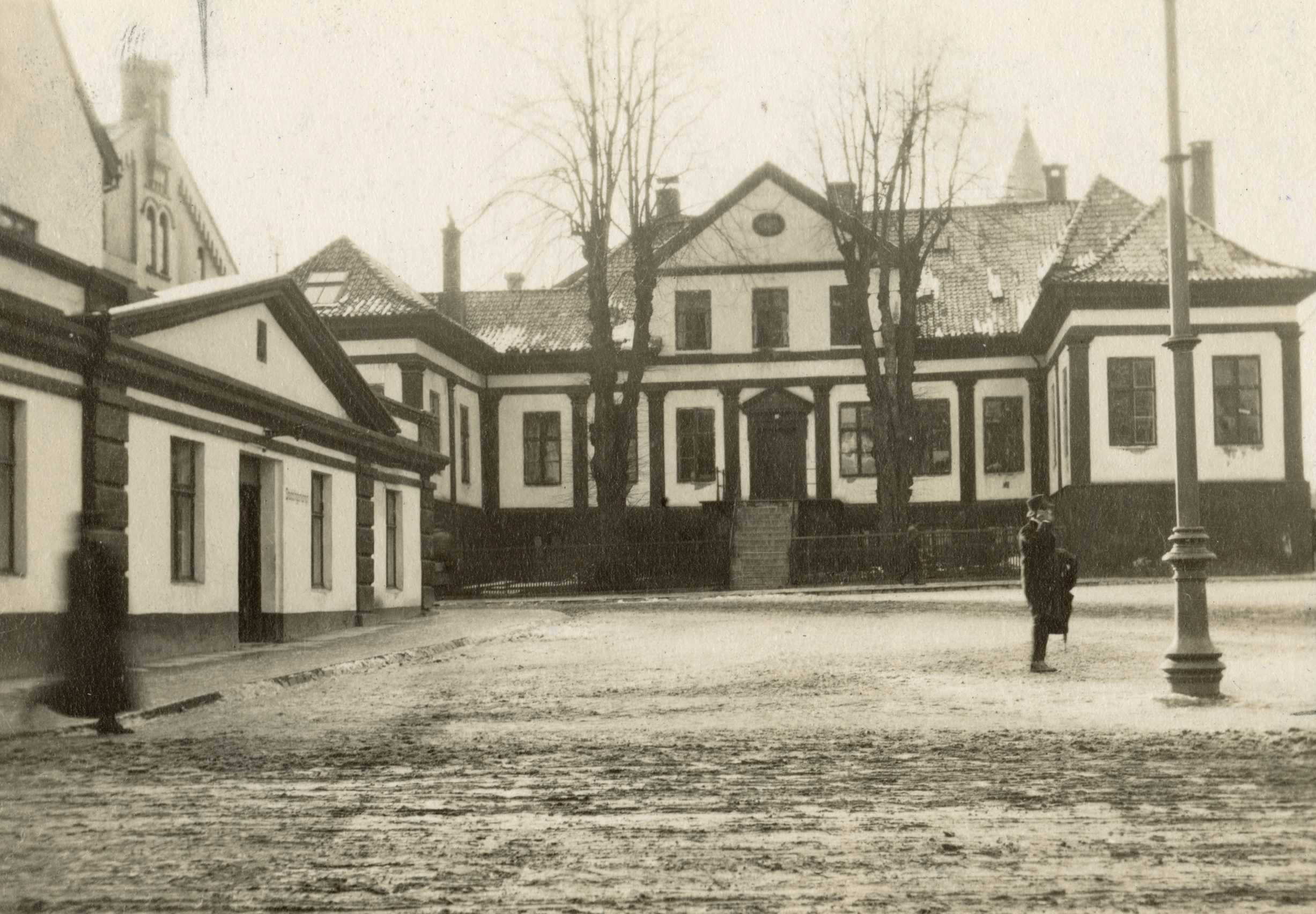 Hagerupgården, Stiftsgården i Bergen, Hordaland